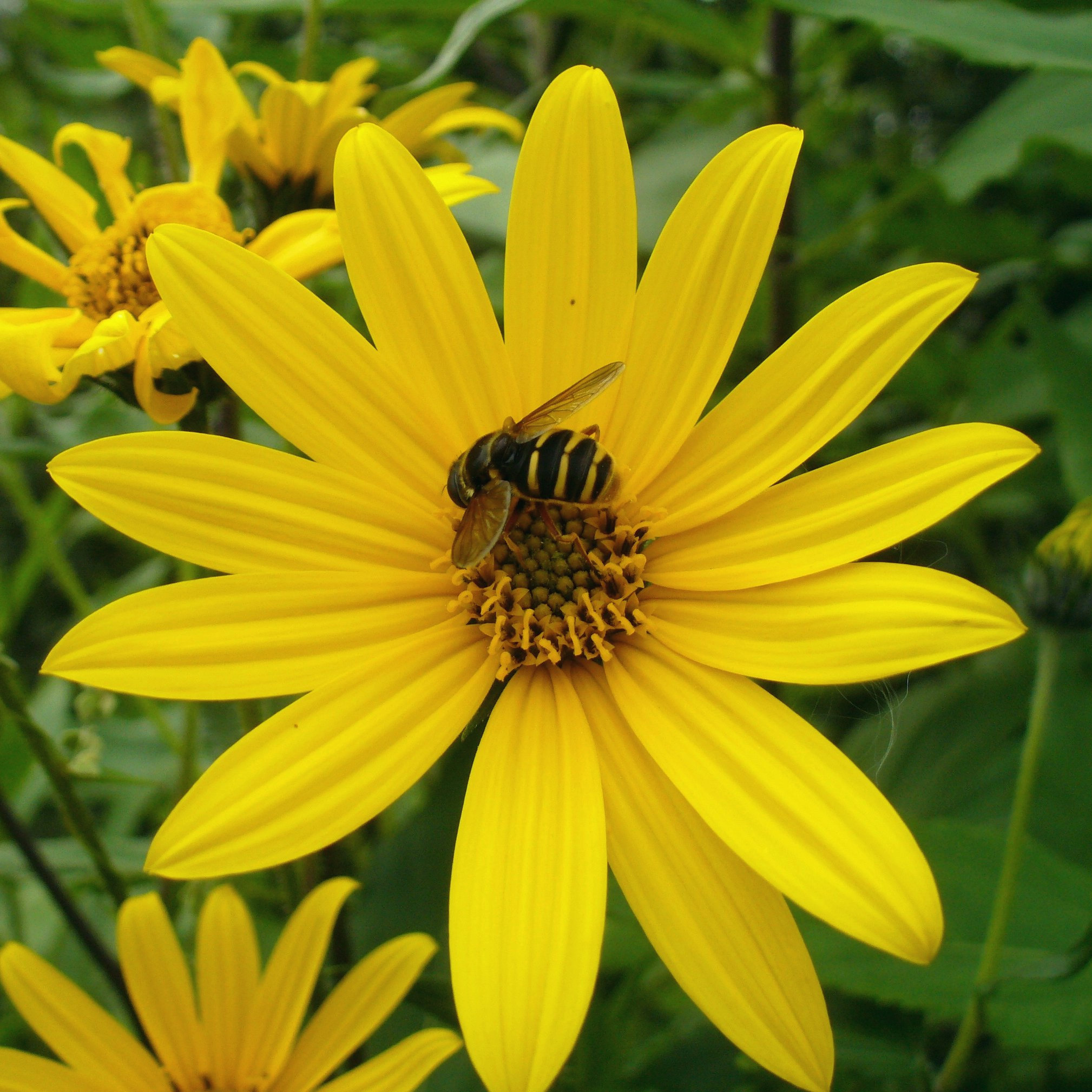 Соцветие топинамбура и муха-журчалка